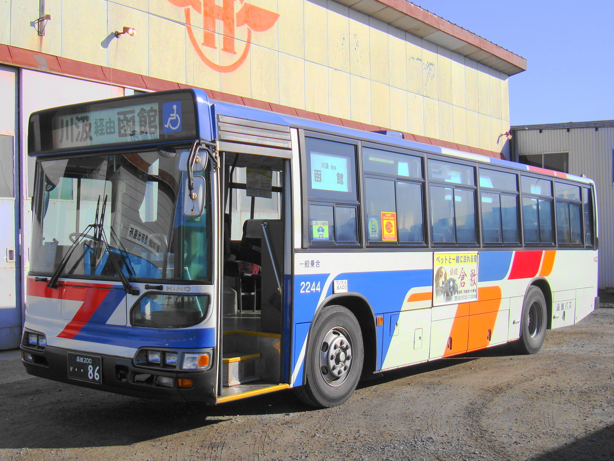 Shikabe to Hakodate